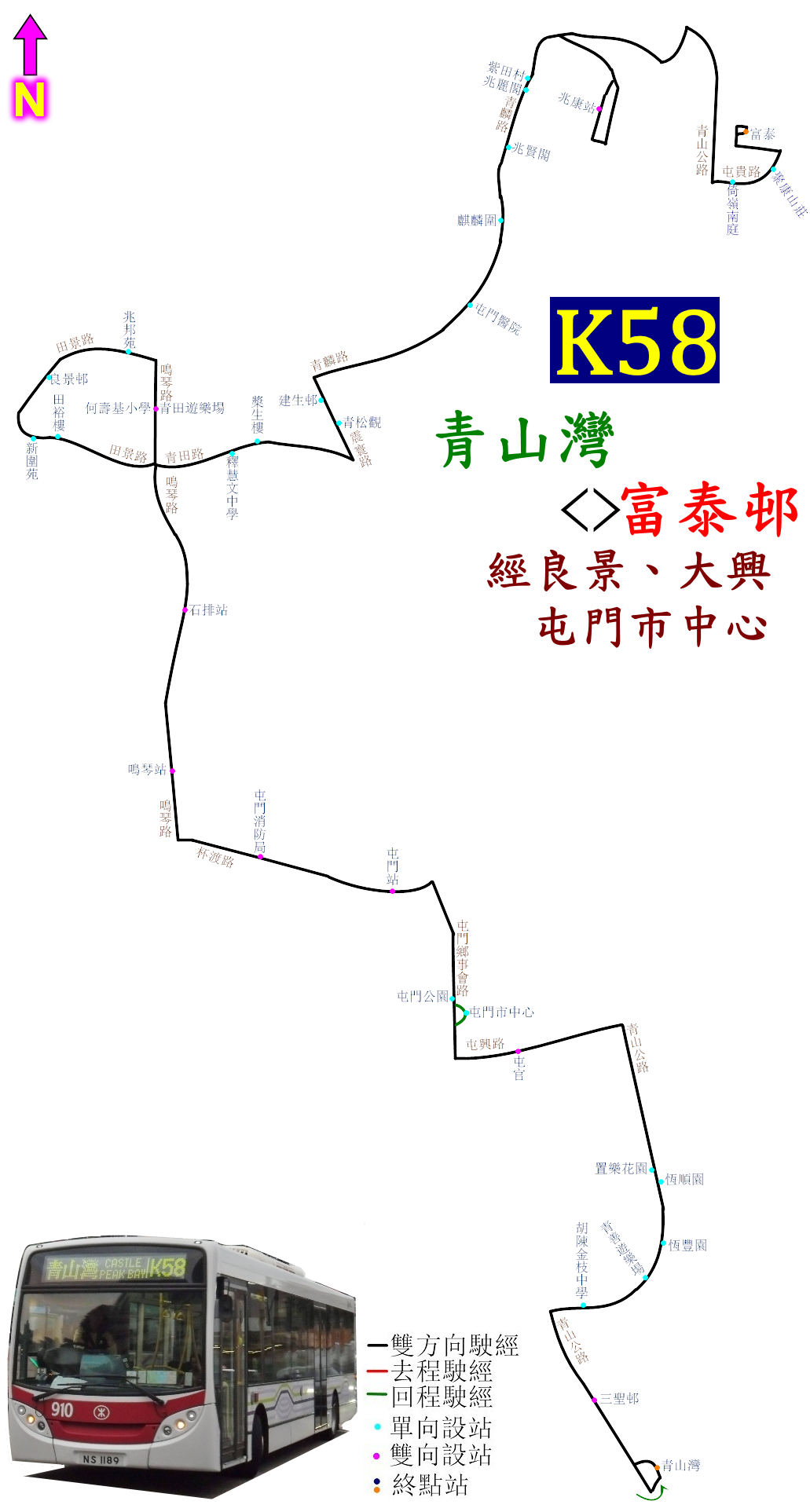 中文（香港）: 港鐵巴士K58線的地圖式路線圖